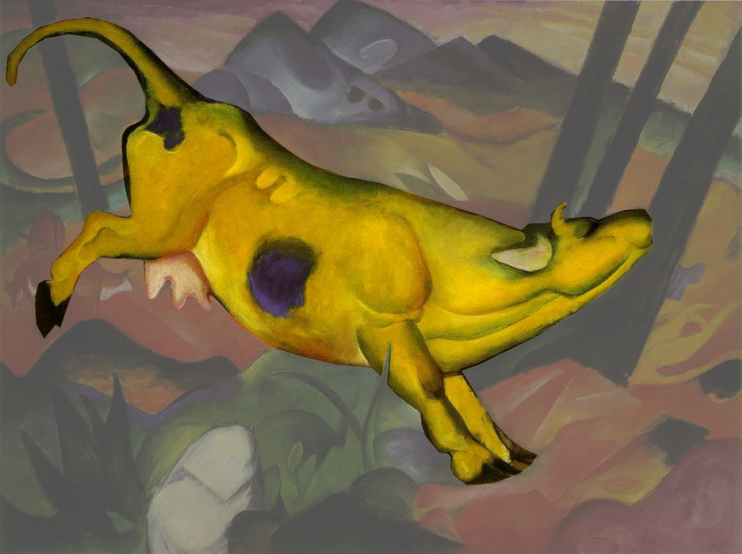 Bearbeitung von File:Franz Mark-The Yellow Cow-1911.jpg, Zentralmotiv freigestellt